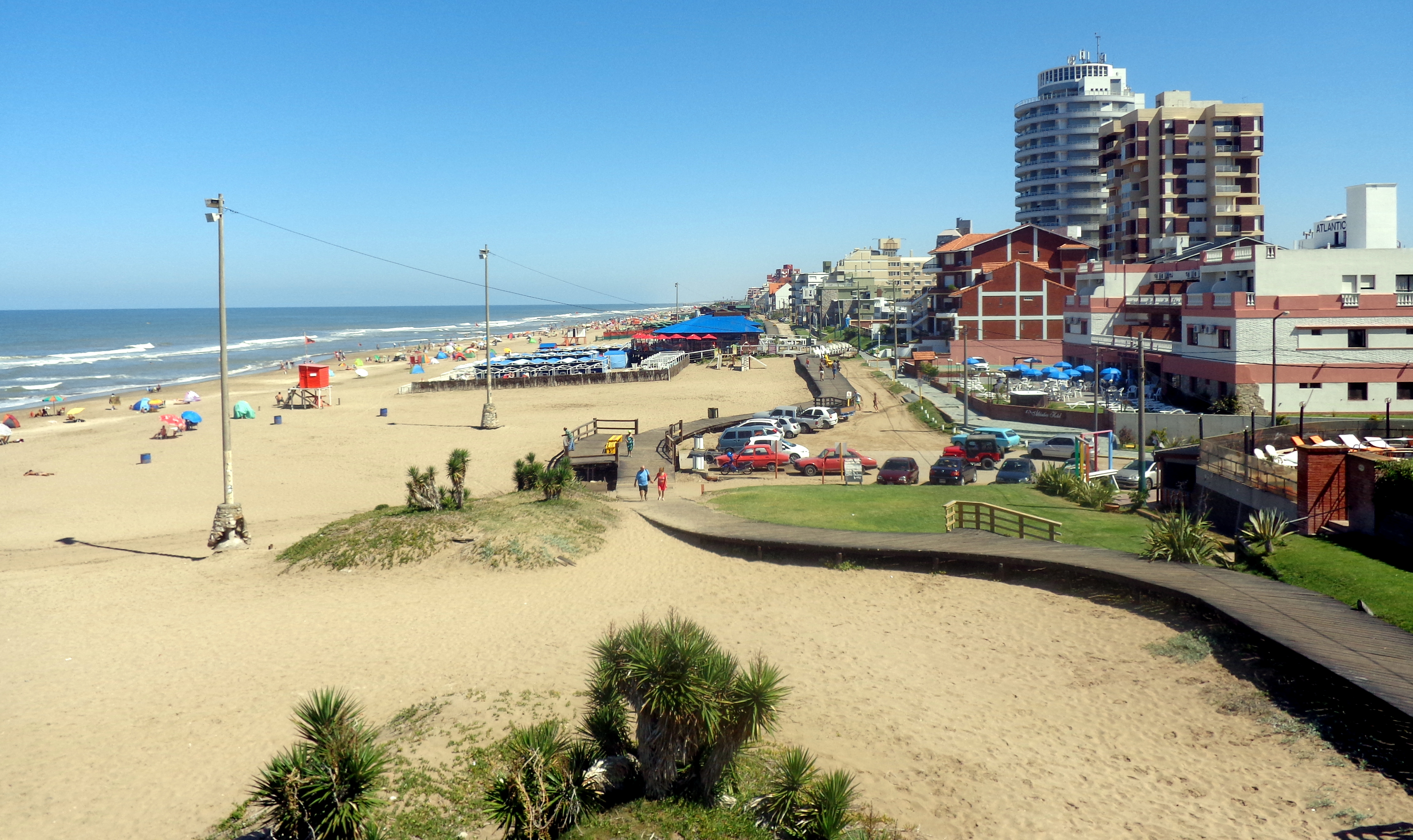 Costa de Villa Gesell, con su rambla de madera, en la provincia de Buenos Aires, Argentina.